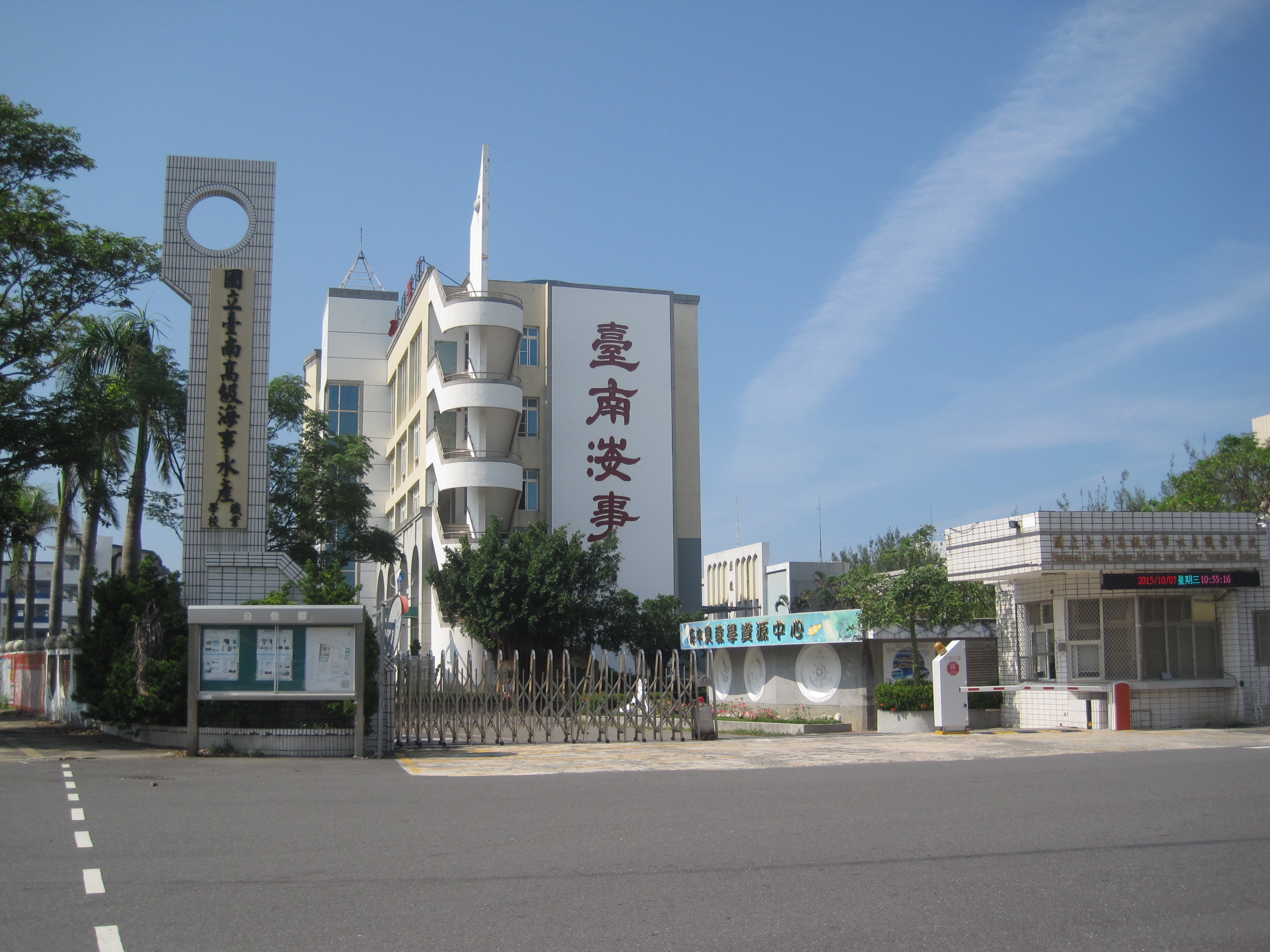 國立臺南高級海事水產職業學校